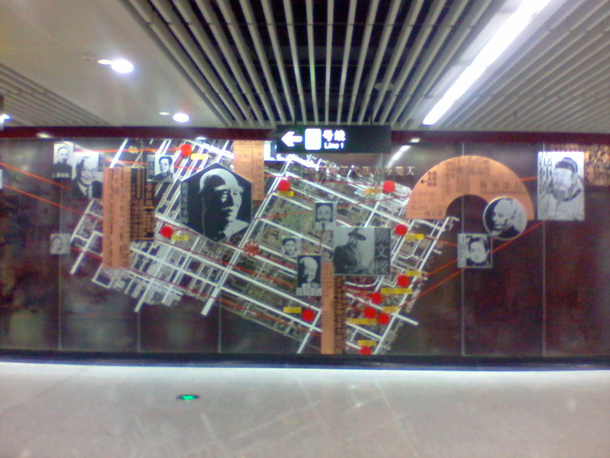 苏州地铁乐桥站艺术墙，Huhaoyu321摄影于2012年4月28日